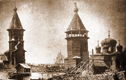 Успенская церковь (Кондопога), колокольня и зимняя церковь в начале XX века